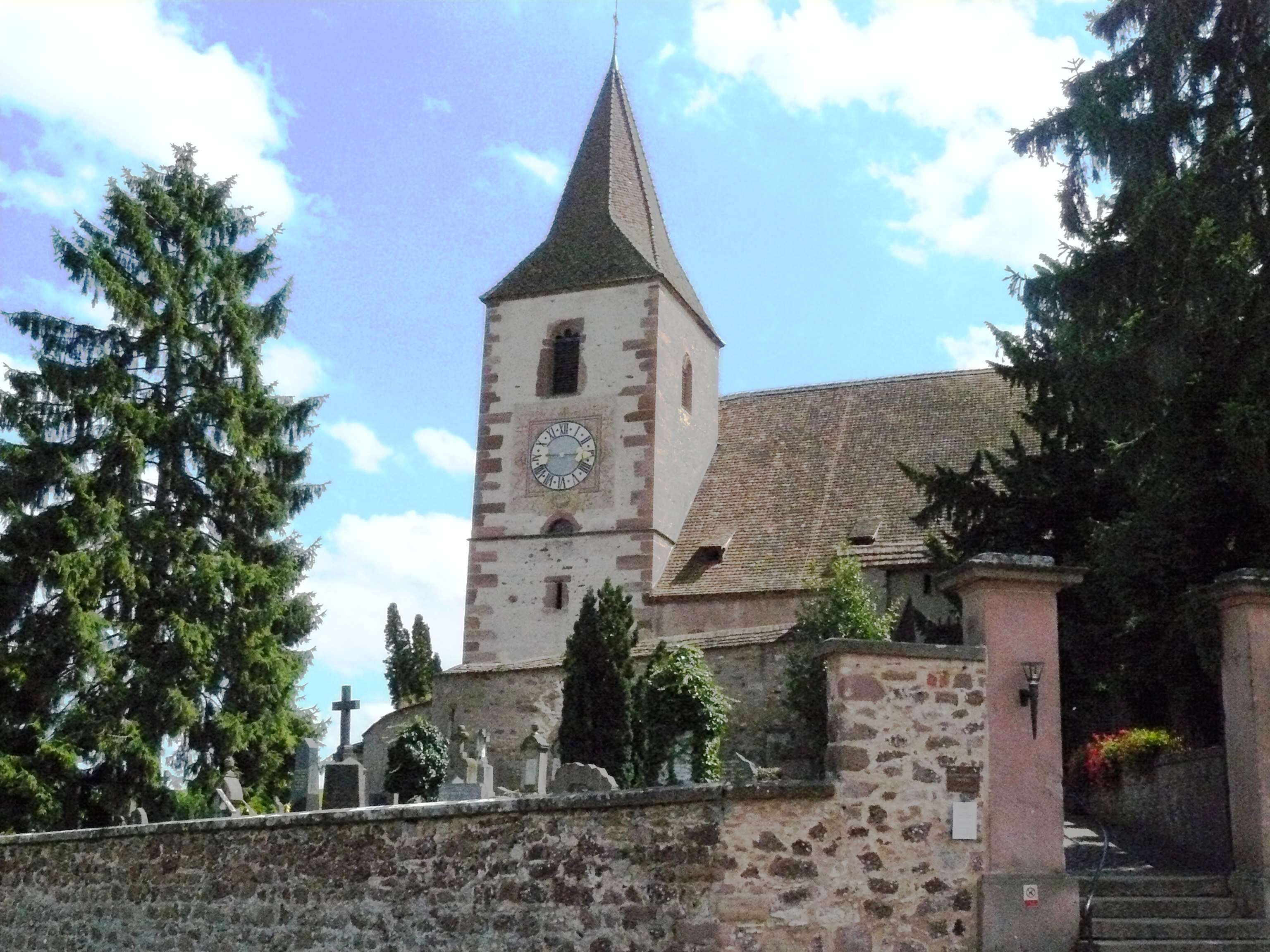 Église fortifiée de Hunawihr